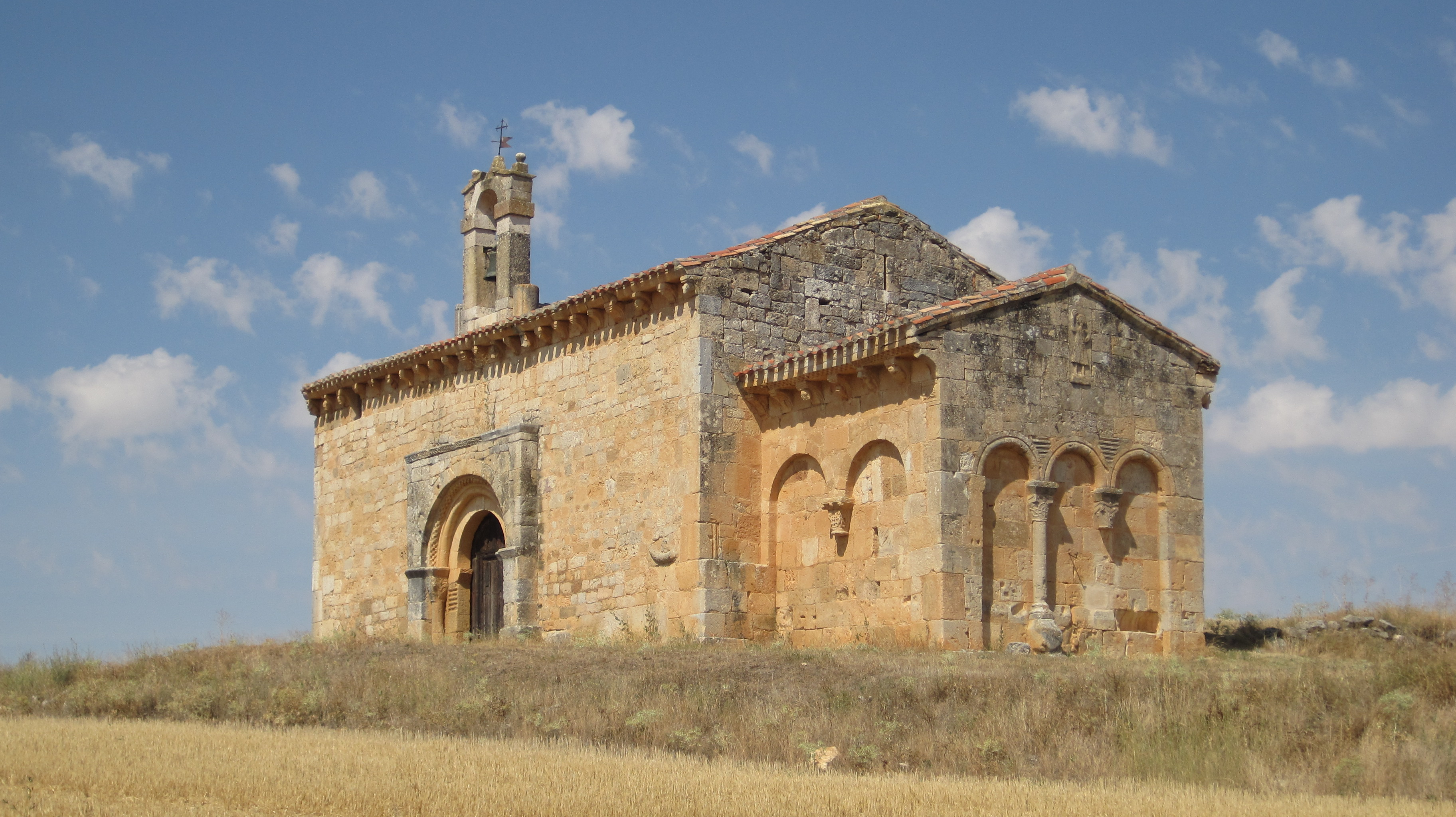 Vista general de la ermita del Santo Cristo, en Coruña del Conde (Burgos, España).